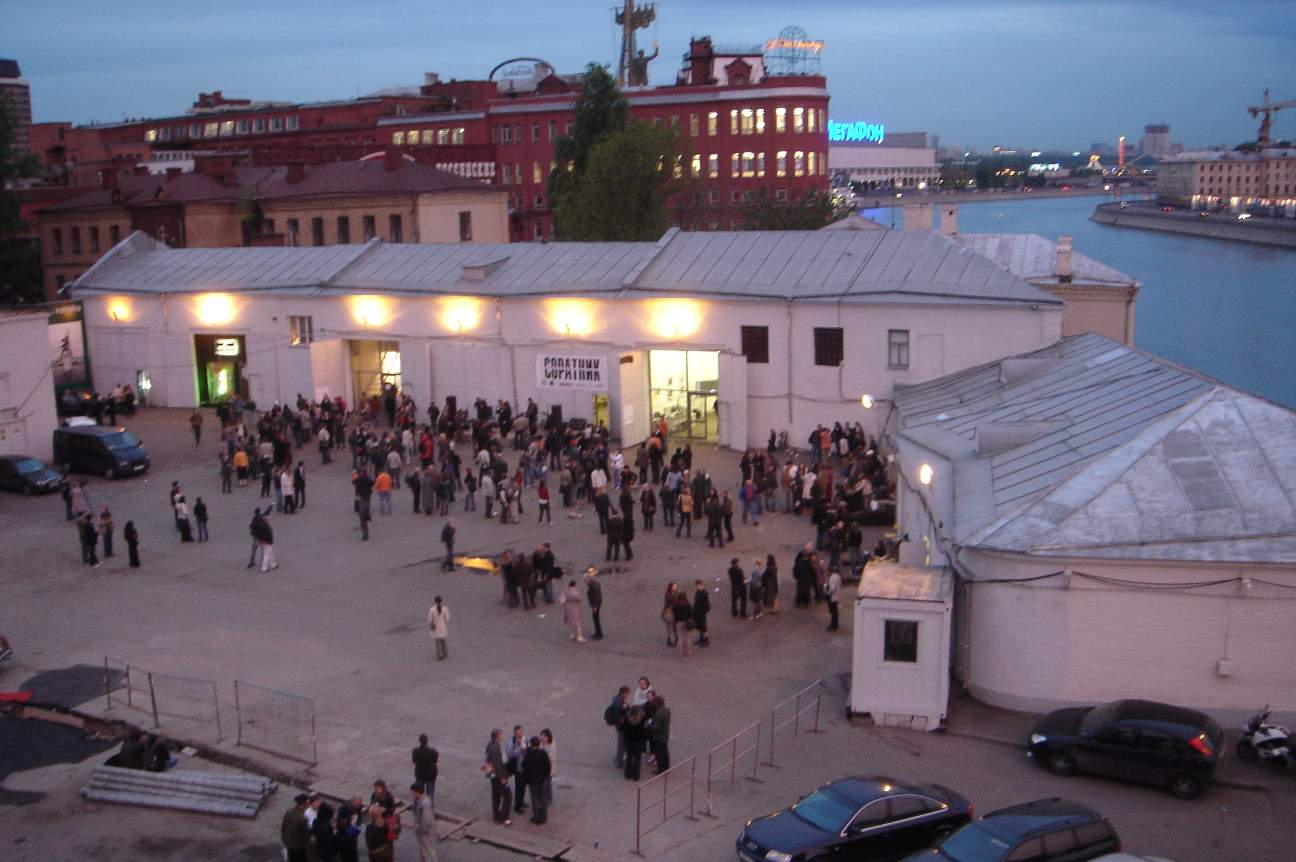 Москва, АРТСтрелка, 19 мая 2006 г., вручение премии «Соратник»